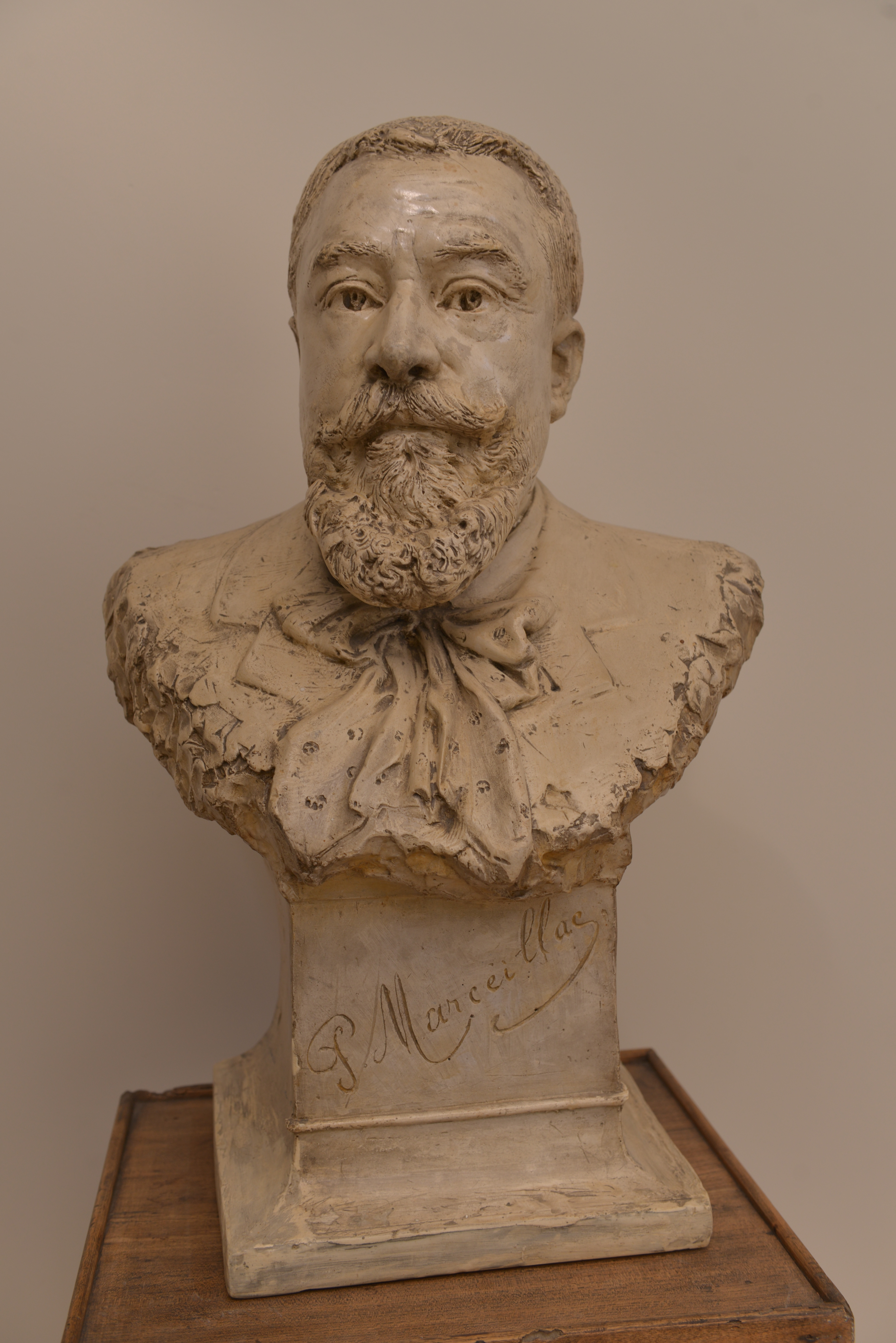 Portrait de Pierre-Adrien Marceillac, fondateur et propriétaire de l'hôtel Merceillac à Castelsarrasin